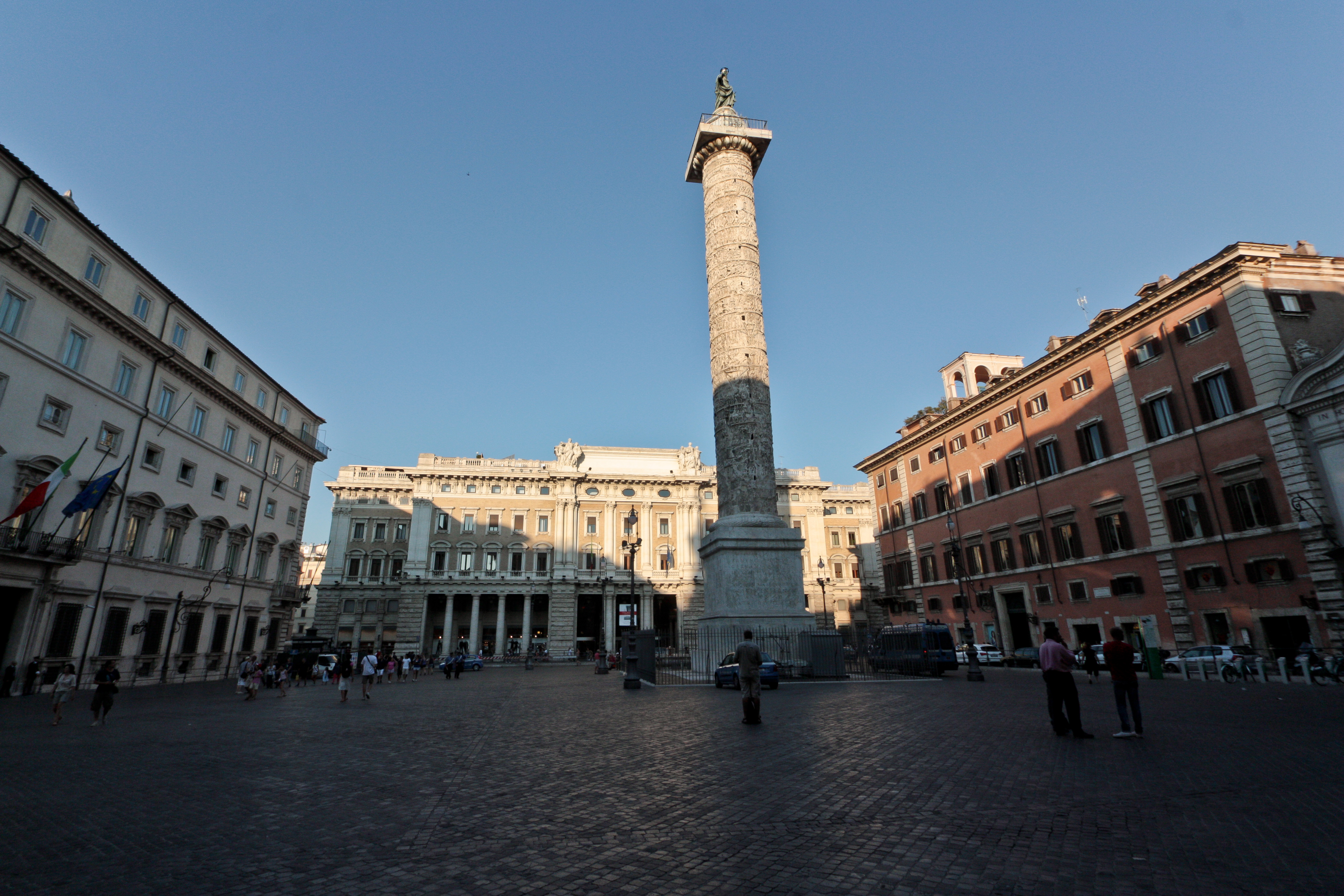 Galleria Alberto Sordi (già Galleria Colonna) e la Colonna Traiana - Vista da Piazza Colonna